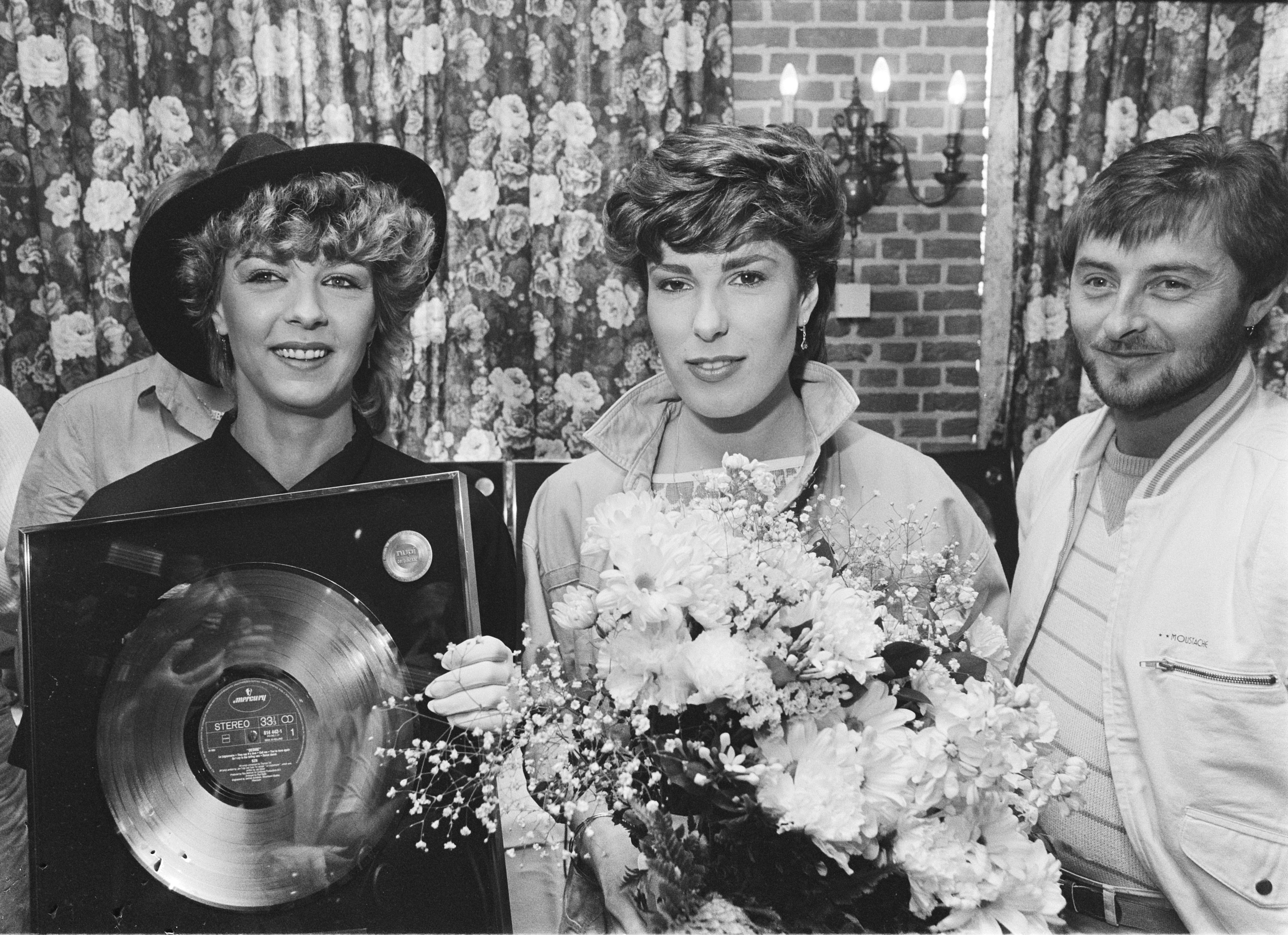 Afscheid Annie Schilder van popgroep BZN; v.l.n.r. Annie Schilder, Carola Smit en Jan Keyzer